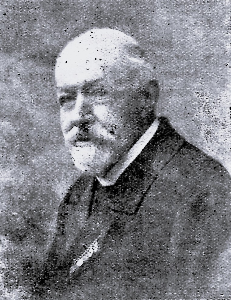 Heinrich Georg Bernhard Radbruch, Kaufmann, Lübecker Bürgerschaftsmitglied und Vater Gustav Radbruchs